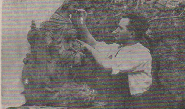 Foto tomada de: Fernández Álvarez, Florentino. Historia Mariana de Asturias. Oviedo, 1988